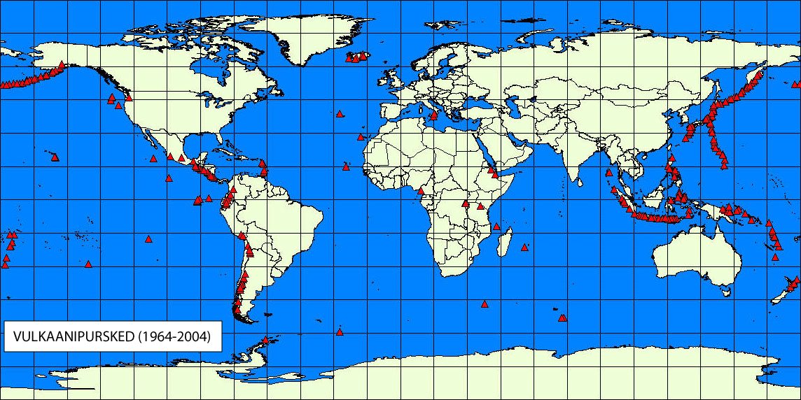 Ajavahenikus 1964–2004 tegutsenud vulkaanid. Koostatud NGDC andmebaasi alusel.